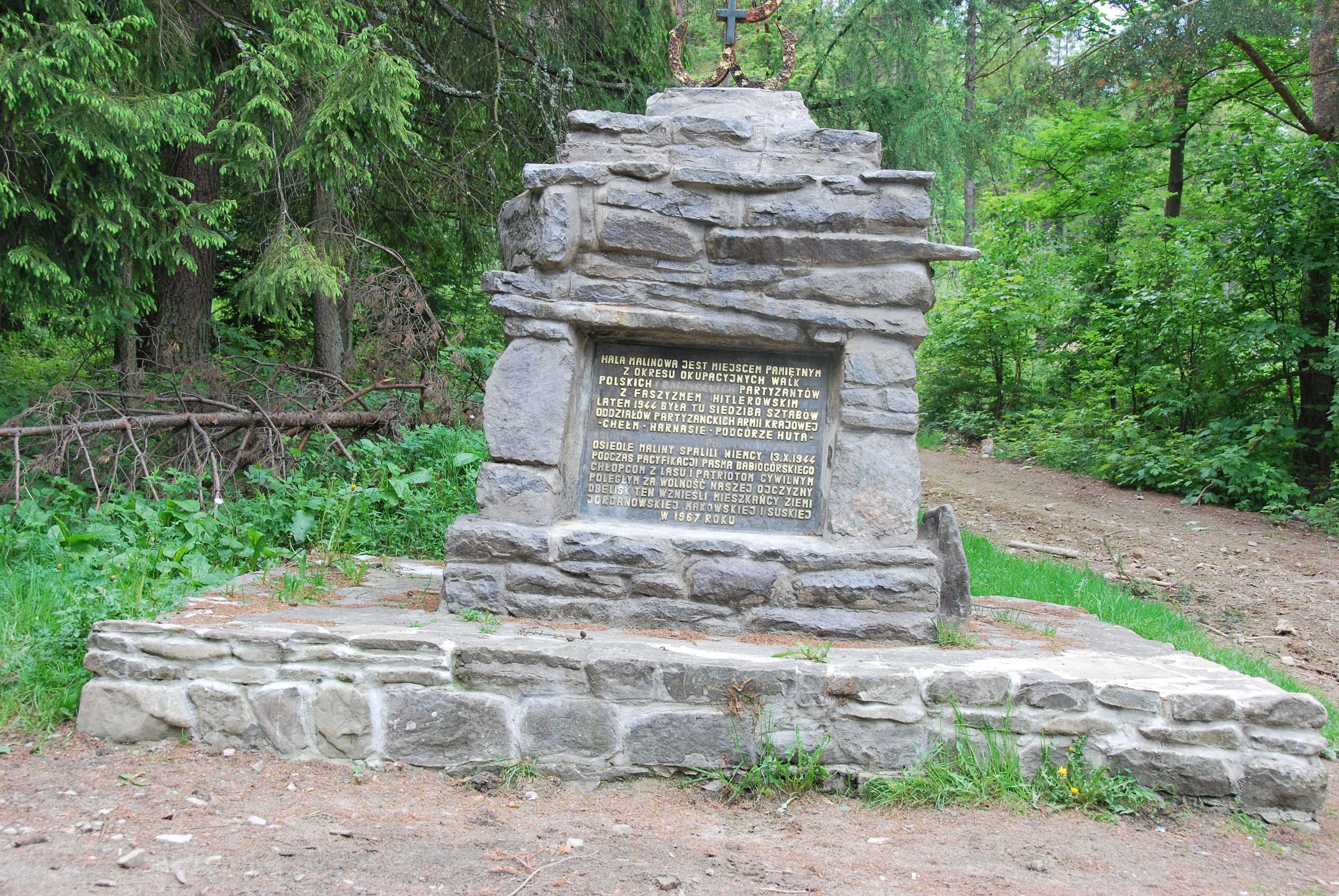 Obelisk na Hali Malinowej upamiętniający pacyfikację osiedla Maliny przez hitlerowców 13.10.1944 r.